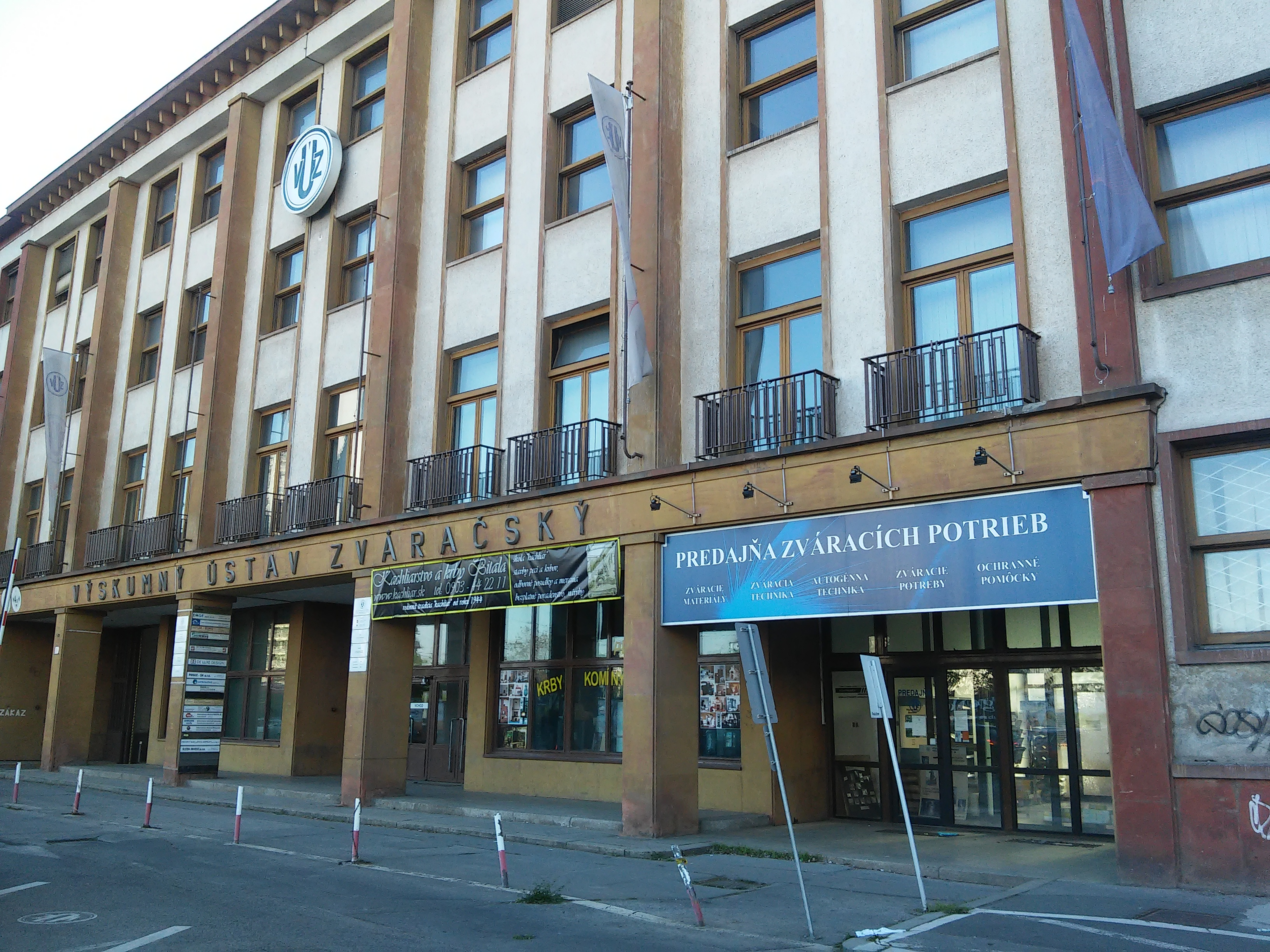 Výskumný ústav zváračský, Račianska 71, Nové Mesto, Bratislava